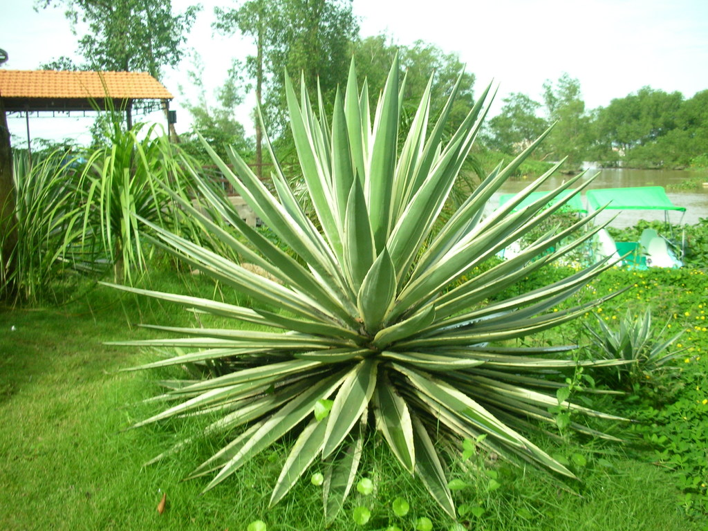 Thùa lá hẹp hay thùa lá trắng, dứa lá trắng (danh pháp khoa học: Agave angustifolia, đồng nghĩa: Agave breedlovei, Agave vivipara). Hình do tôi chụp